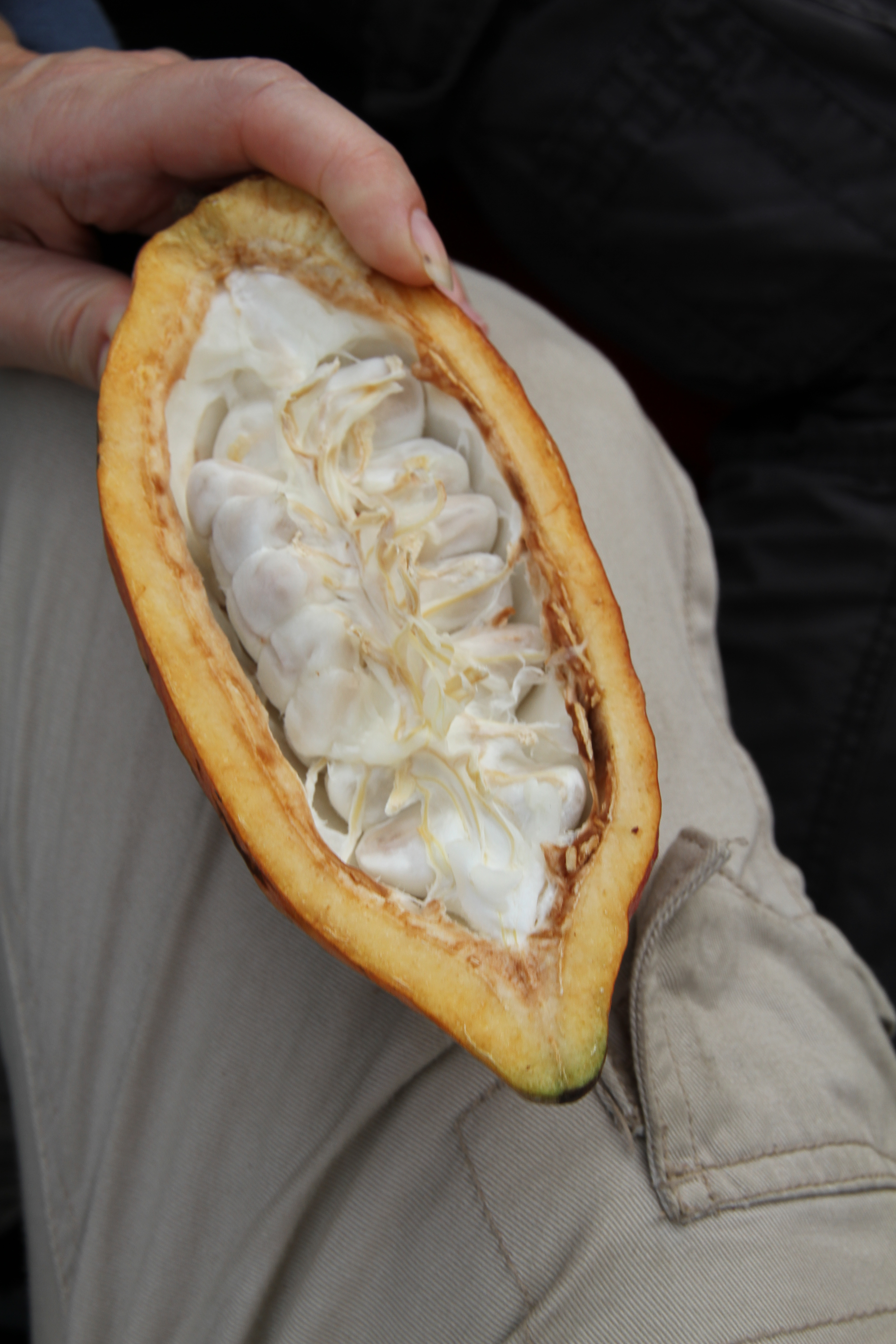 Cacao